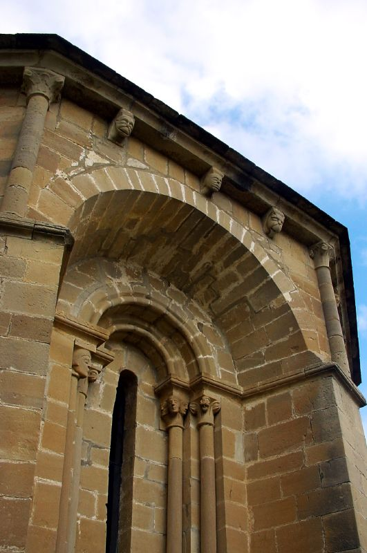 Tuestako Jasokundearen Andra Mariren elizaren xehetasuna.